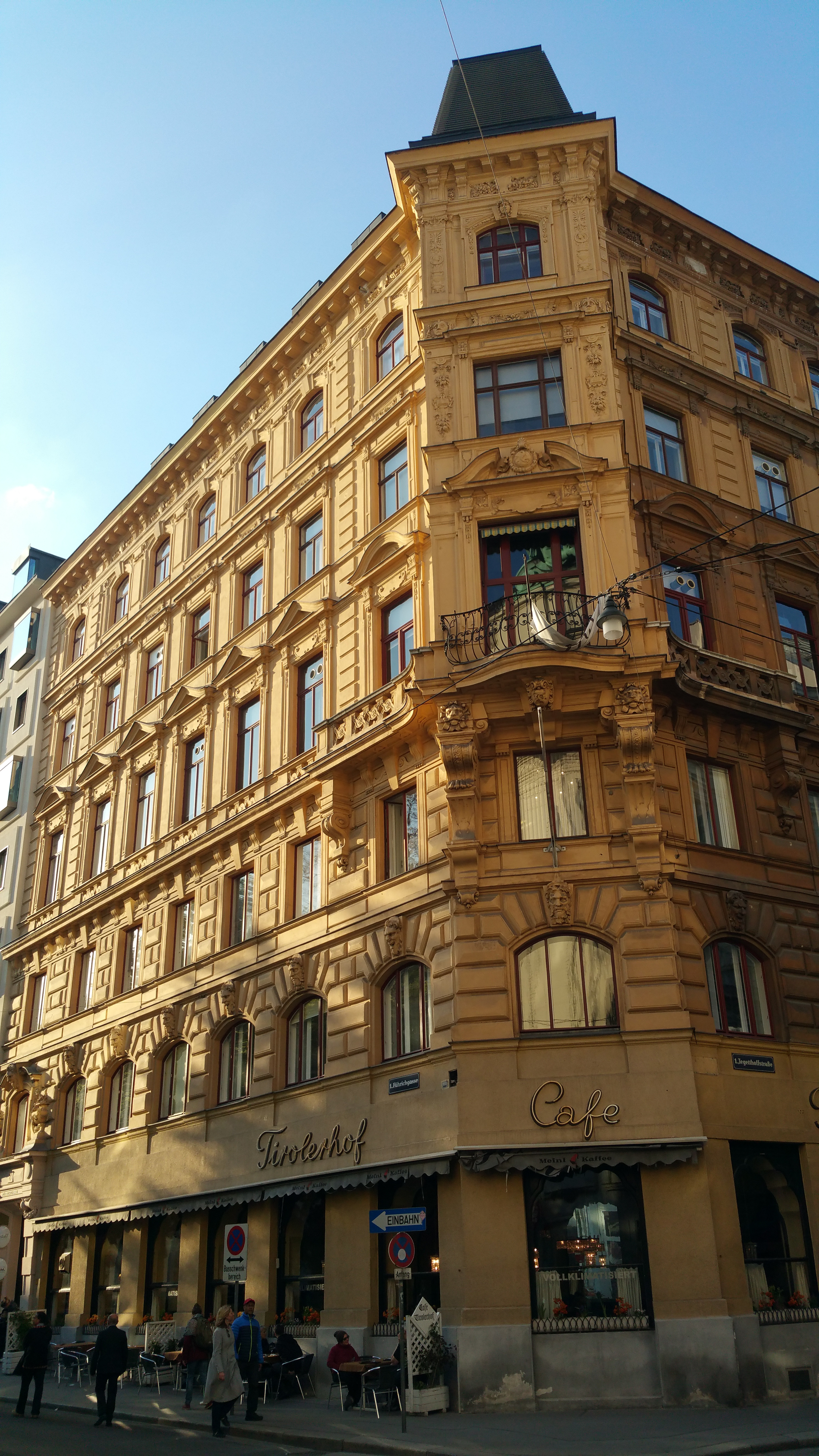 Eckhaus (1885-86) von Carl König, Führichgasse 8, Wien-Innere Stadt